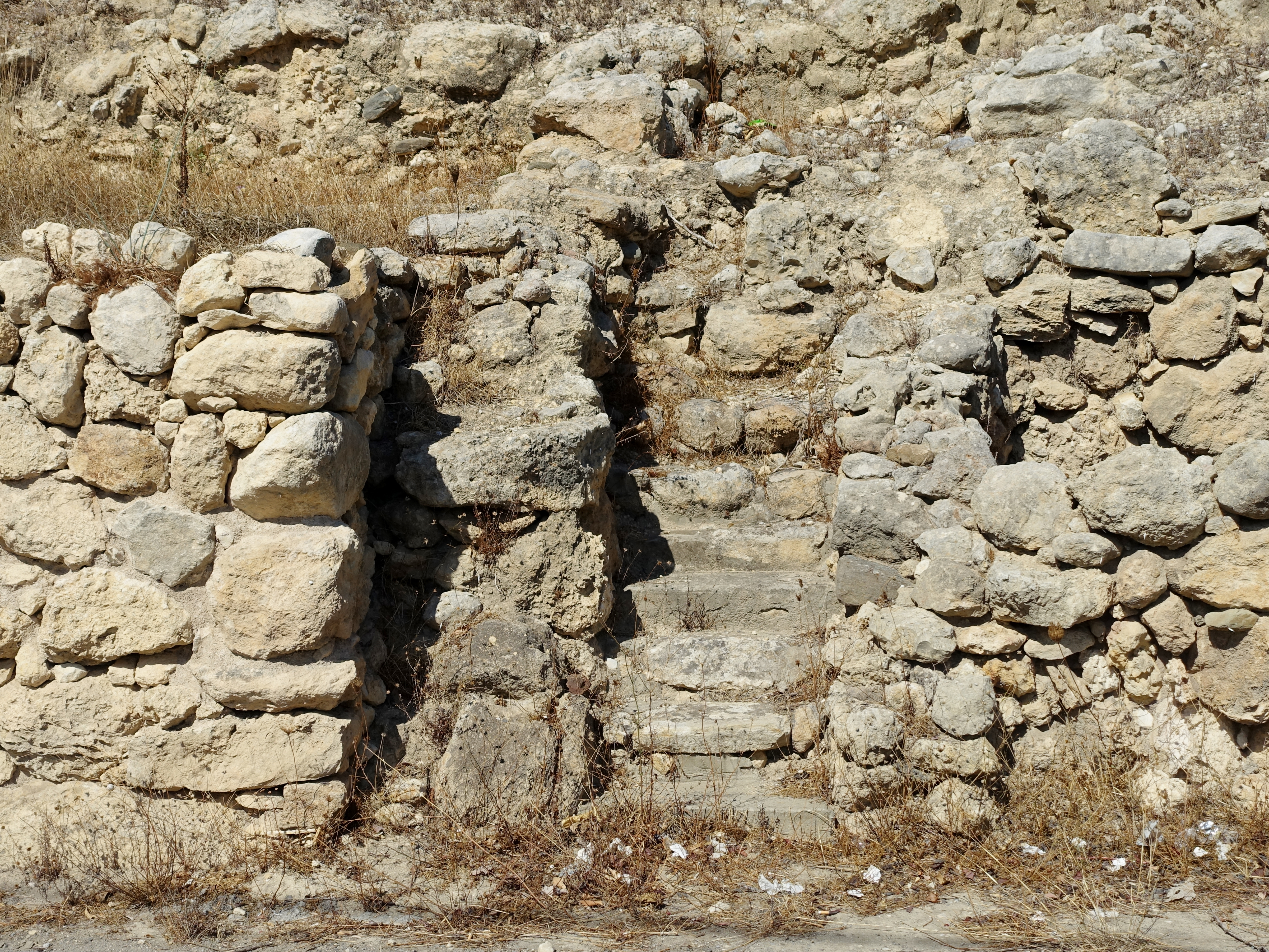 Minoische Villa von Klimataria, Gemeinde Sitia, Kreta, Griechenland